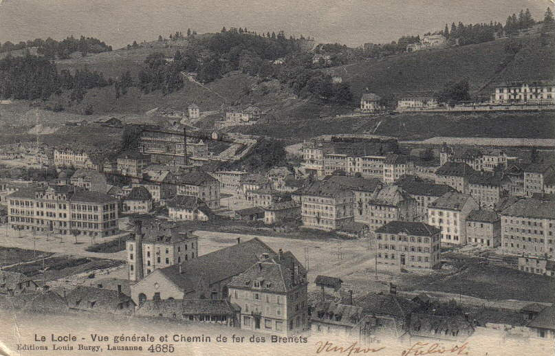 Le Locle, Hauptstraße und Eisenbahn (1907). Verlag: Louis Burgy, Lausanne